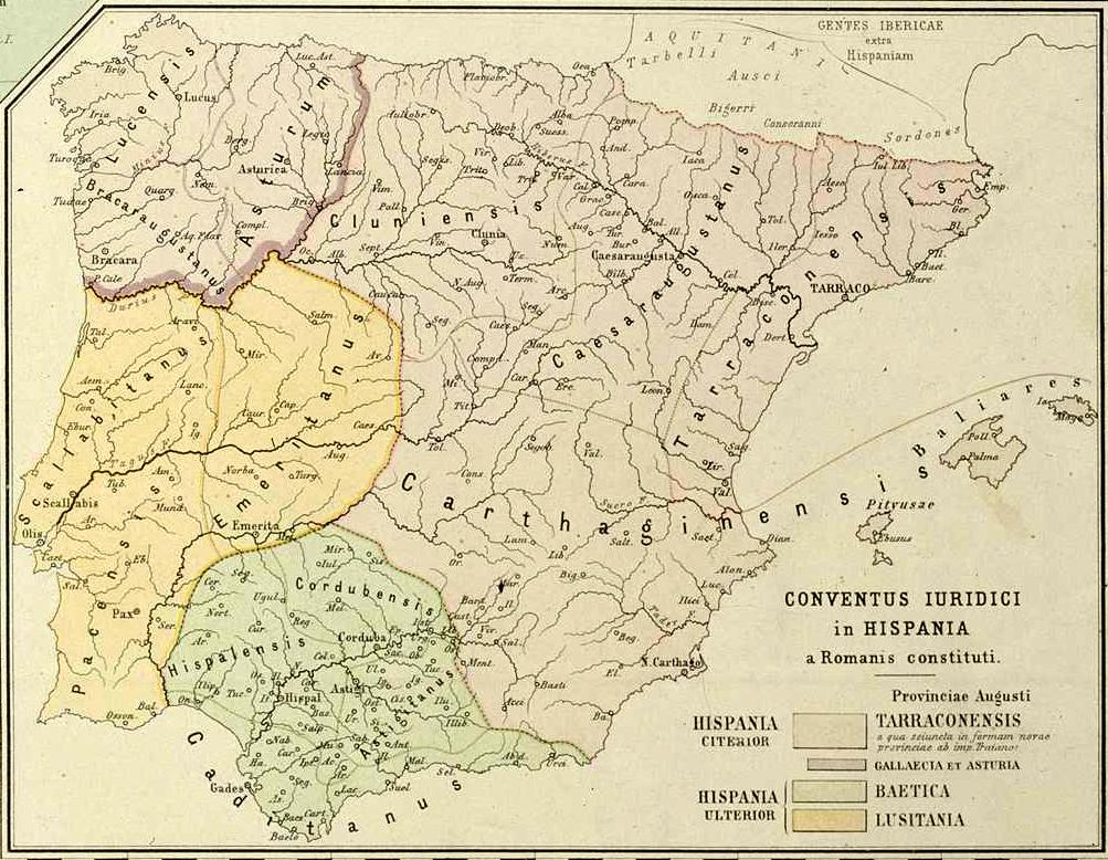 Mapa de los conventi iuridici en Hispania.